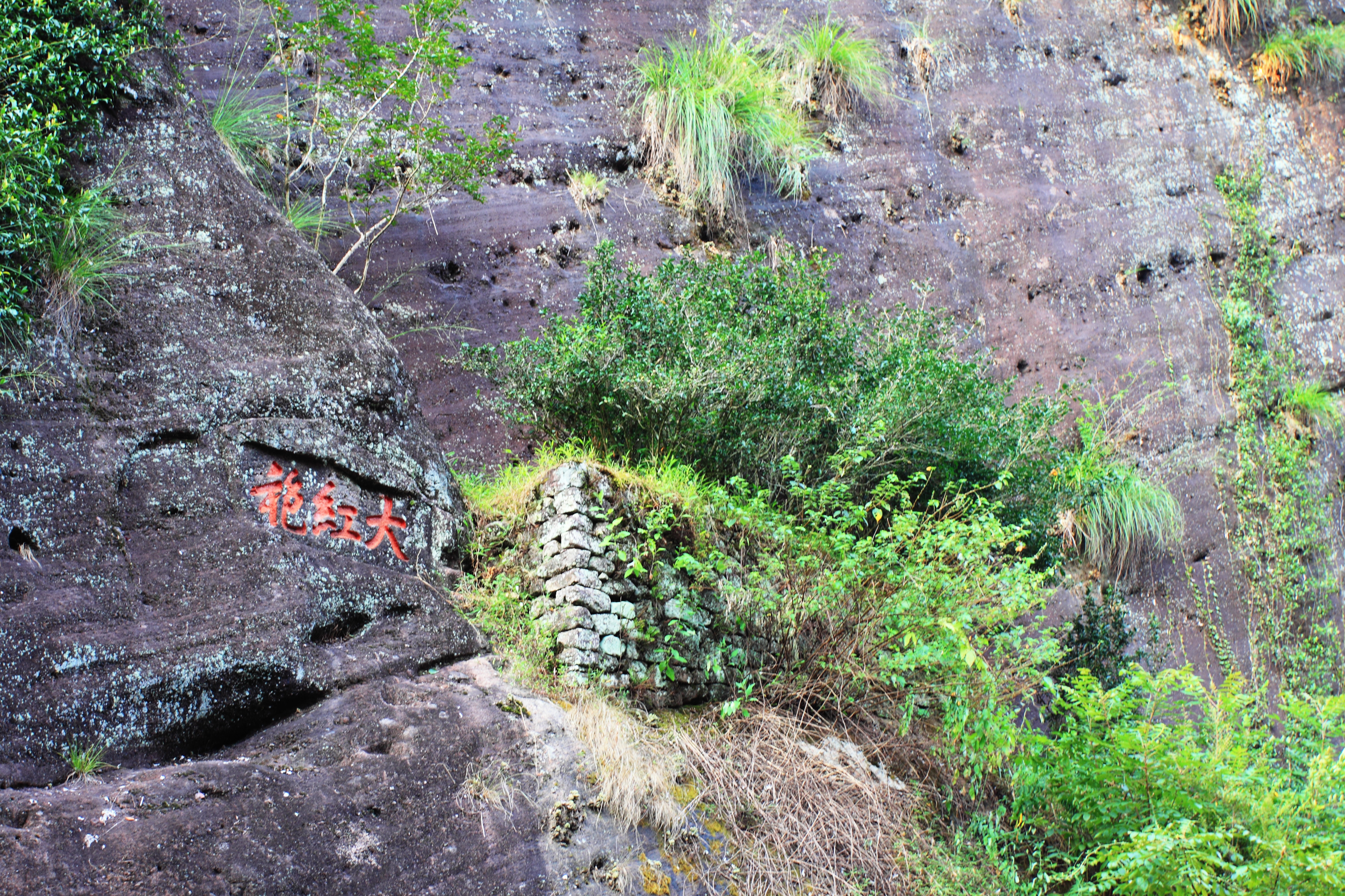 大红袍